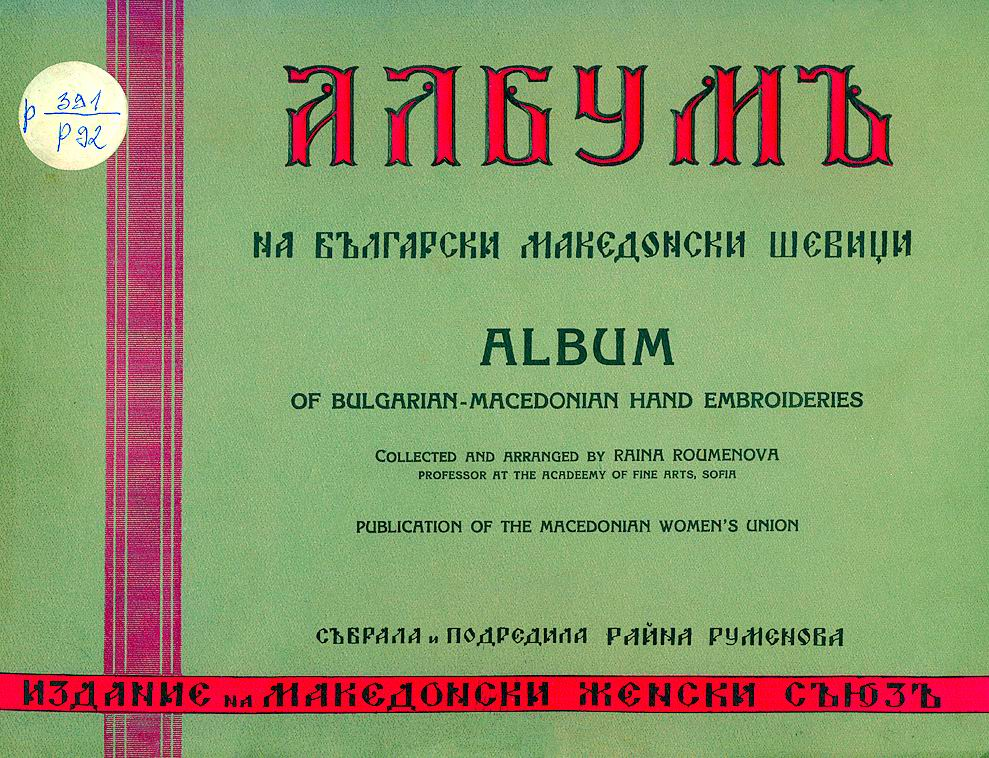 Албум с шевици, издание на Македонския женски съюз.